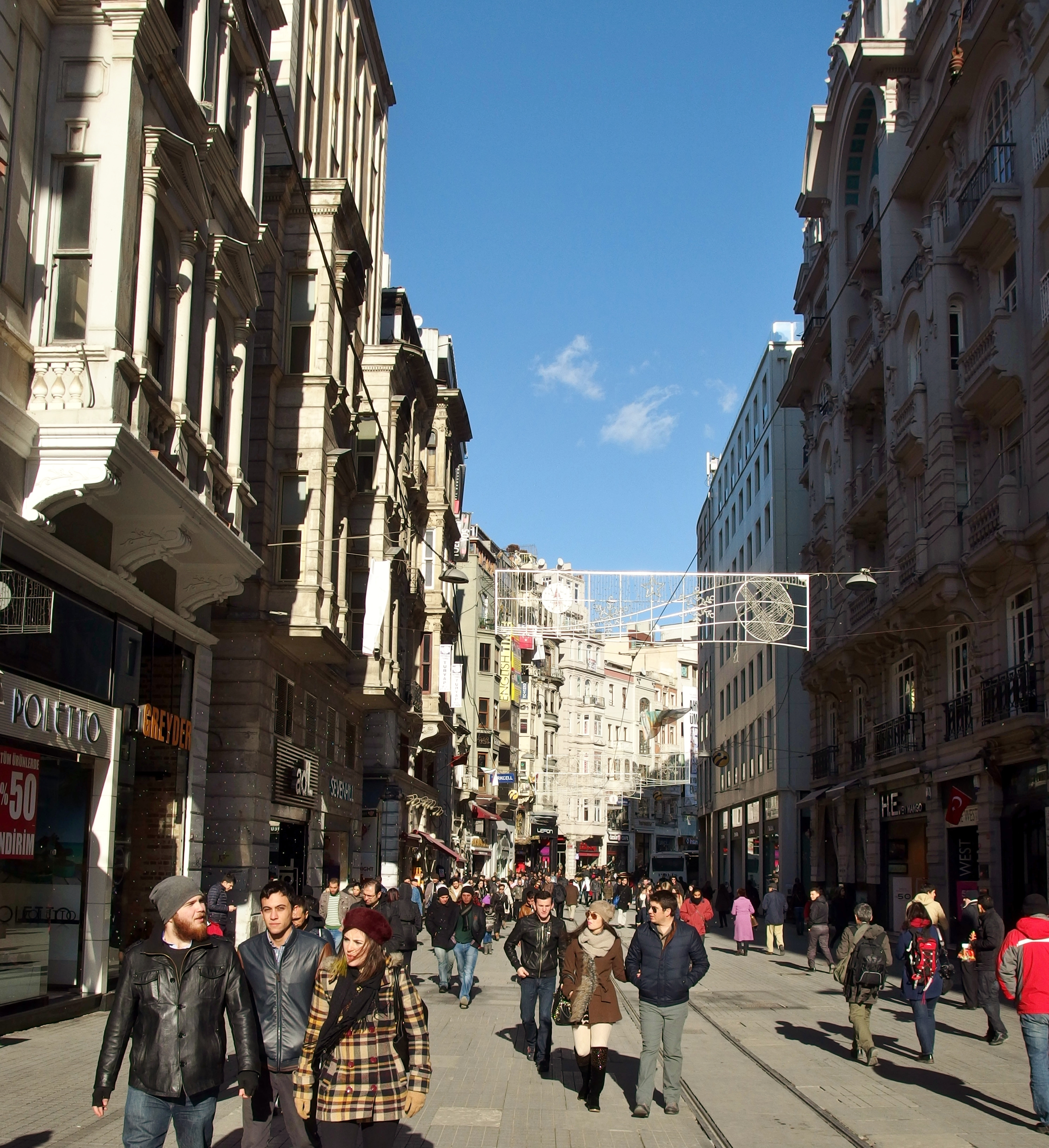 İstiklal Avenue in Istanbul